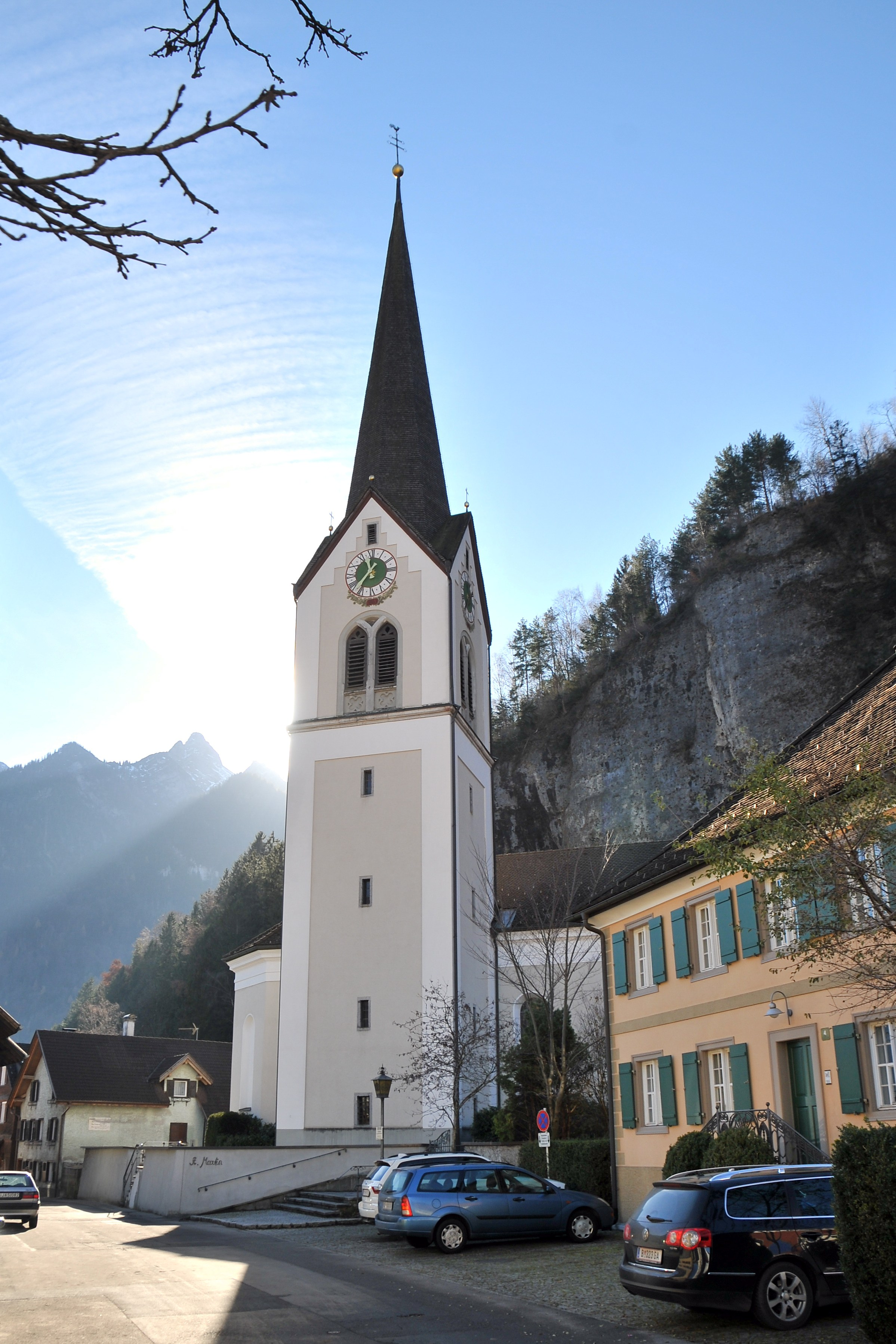 Kath. Pfarrkirche hl. Martin in Bürs an der Obergasse Nr. 4a: 1347 wurde hier die erste Kirche erbaut und um 1480 erfolgte ein Neubau, von dem noch der Chor erhalten ist. Dieser gotische Bau des 15. Jahrhunderts wurde 1768 barockisiert und nach einem Brand 1843 wurde das Langhaus angebaut und verlängert. Der Hochaltar ist ein neugotischer Aufbau (1886) mit Teilen des ehem. spätgotischen Flügelaltares von 1480. Die Kreuzwegstationen stammen von Josef Anton Bertle aus Schruns (1846).